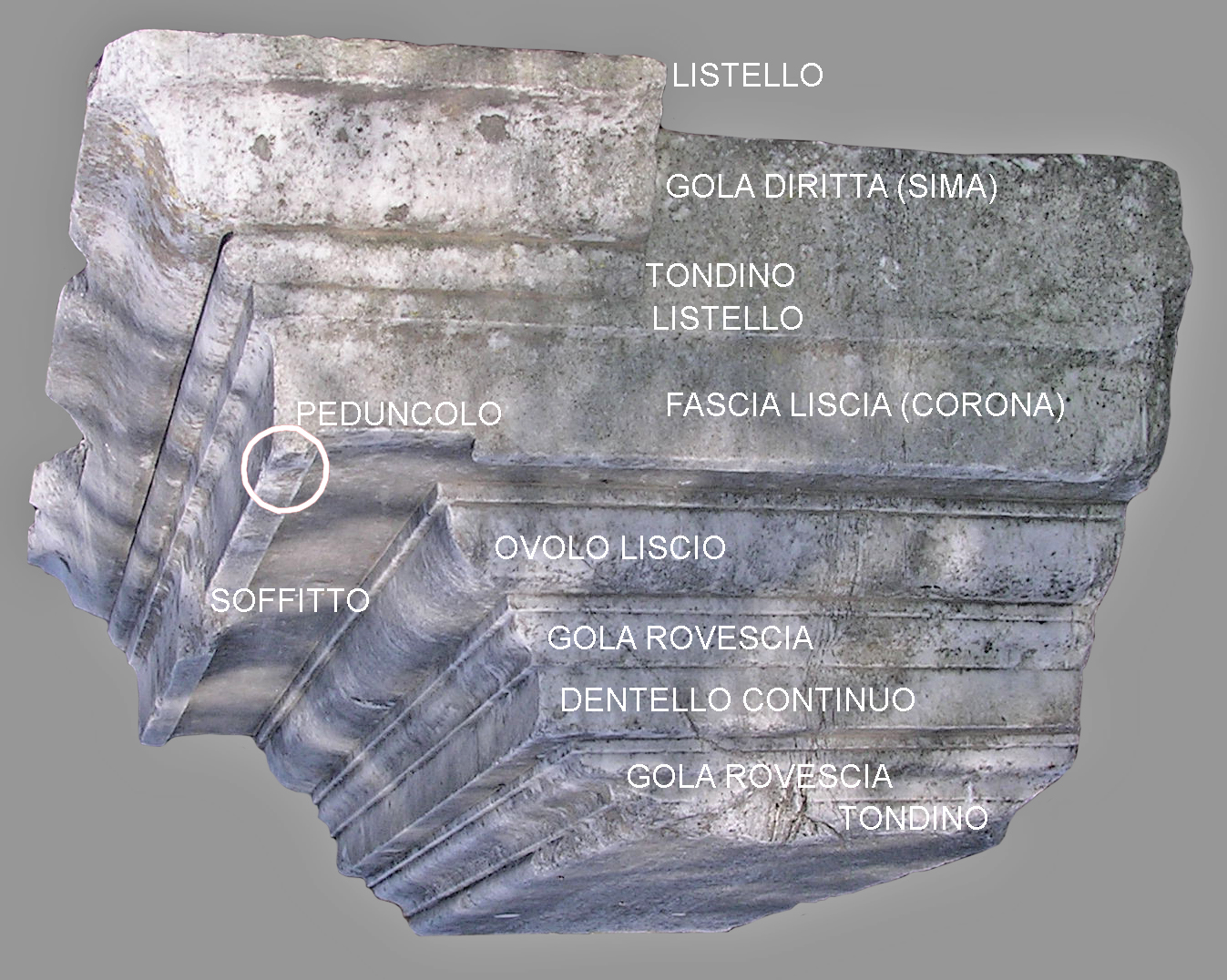 Cornice liscia di epoca romana (Ostia Antica, Roma, Italia) con nomi delle modanature lisce e delle parti costitutive di una cornice